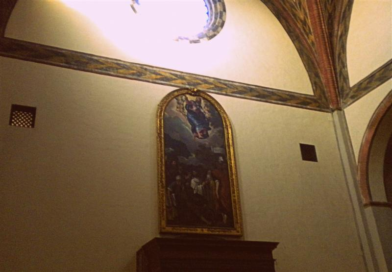 Trafigurazione del Veronese-Damini nella chiesa di San Francesco Grande in Padova